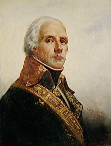 Jacques-Cristophe Coquille, dit Dugommier (1738-1794), marechal de camp d'etat major en 1792 (1736-1794)